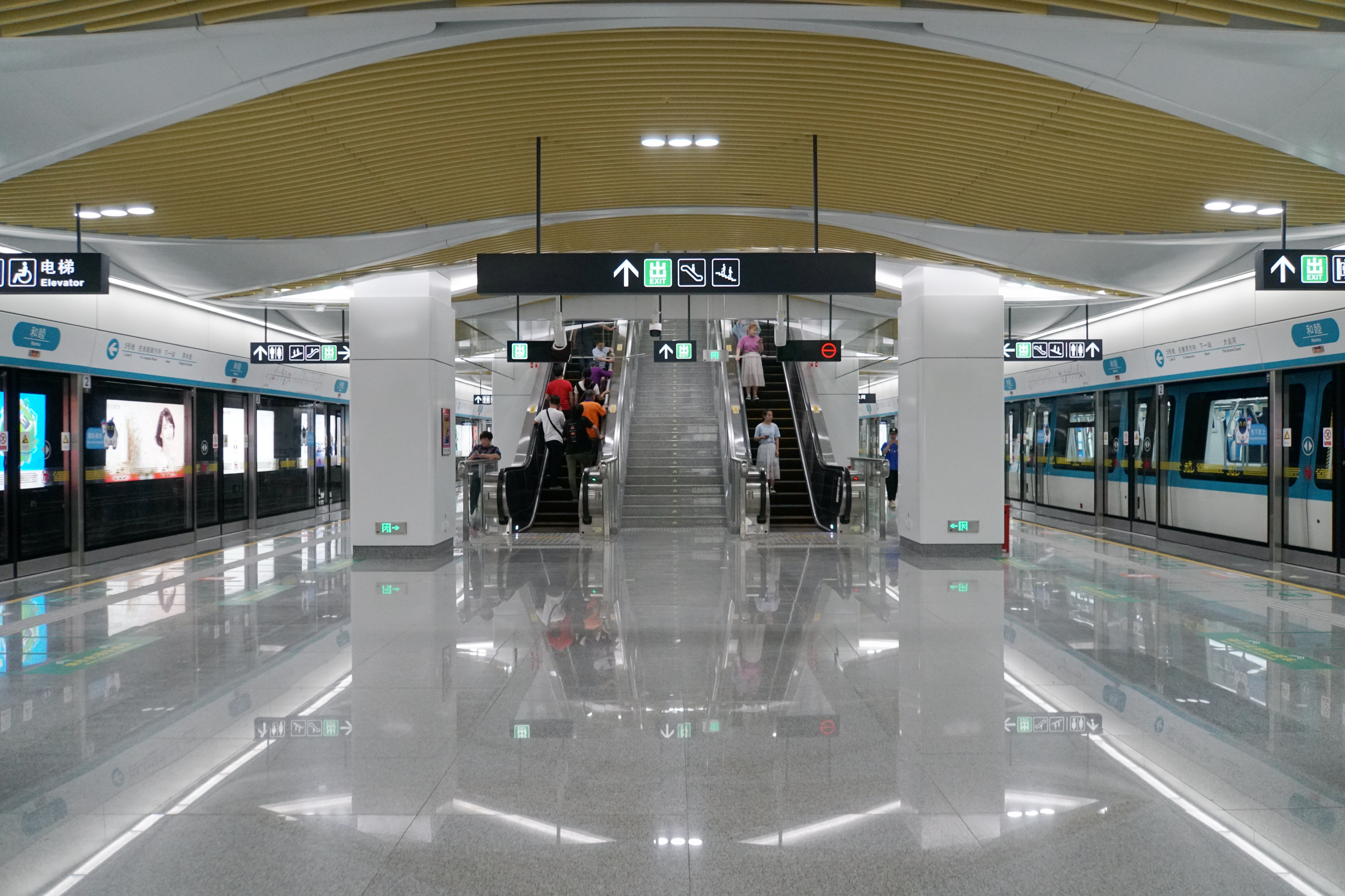 杭州地铁5号线和睦站站台